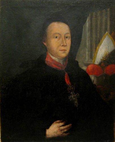 Abt Meinrad Troger. Dritter Fürstabt der Benediktinerabtei St. Blasien. Anonymer Künstler um 1750. Sekundäre Neufassung zu einem Memorialbild. Darstellung der blasianischen Insignien (Pektoral Kaiser Karls VI. von 1731, Fürstenhut der Reichsgrafschaft Bonndorf und infulierte Mitra)